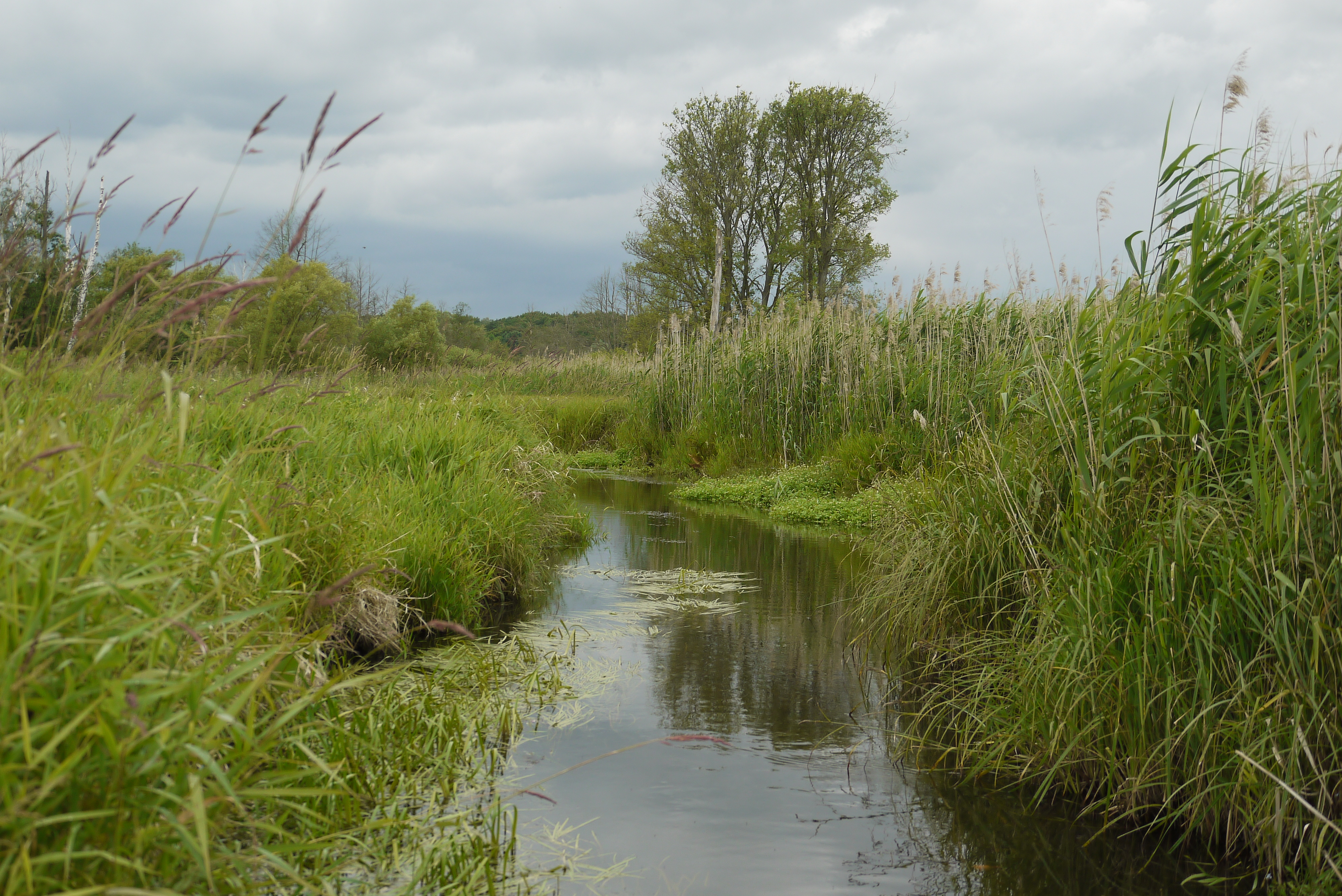 Das Tegeler Fließ wird streckenweise von dichtem Baumbestand gesäumt. Hier durchströmt es die offene Landschaft nördlich der Lübarser Felder innerhalb des Landschaftsschutzgebiets „Tegeler Fließ“ (LSG 10).